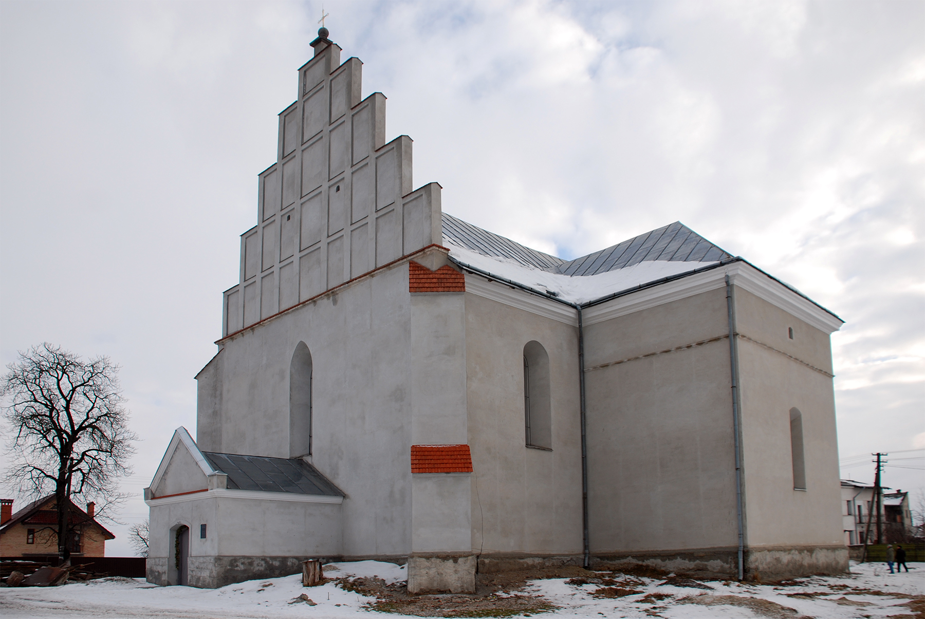 Костел Св.Миколи (мур.), смт.Куликів